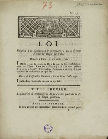 Loi relative à la liquidation & comptabilité des ci-devant ferme & régie générale. Donnée à Paris le 1er août 1791